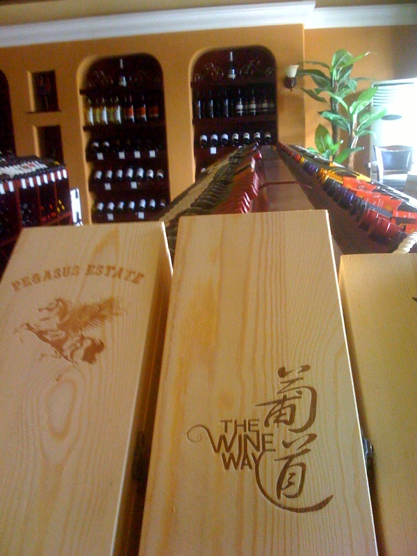 Huawei Winery, Zhongshan Road, Shahekou, Dalian, Liaoning, Chine